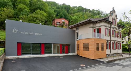 Panoramica di Villa Carolina, sede del Museo della pesca di Caslano